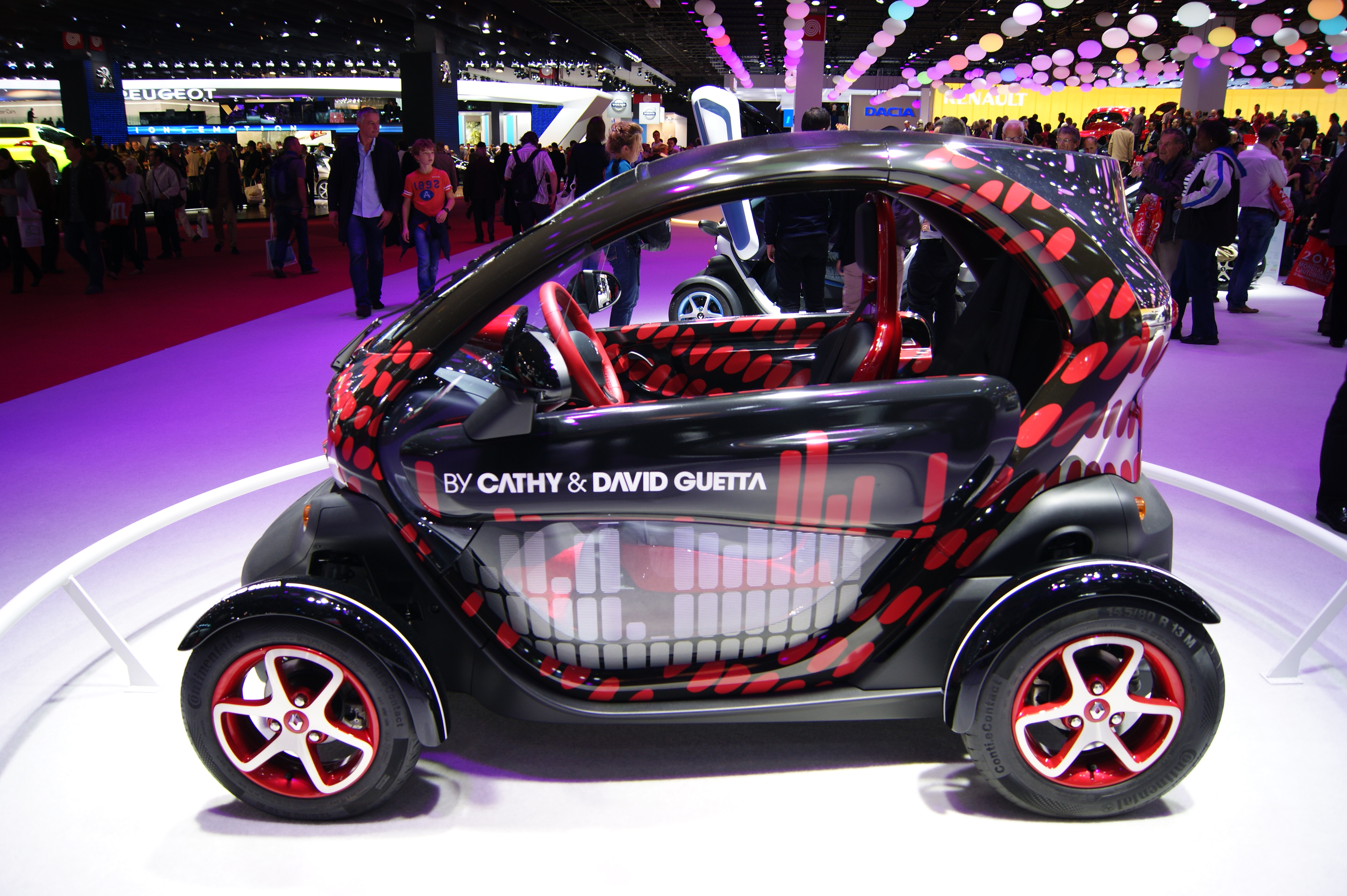 Renault - Twezy